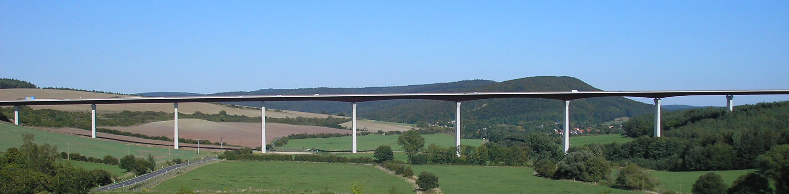 Die Talbrücke Reichenbach (A71) bei Ilmenau (Thüringen).